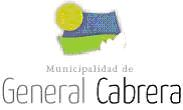 Subido de .ar